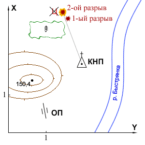 Иллюстрация к статье "Стрельба с закрытых позиций"